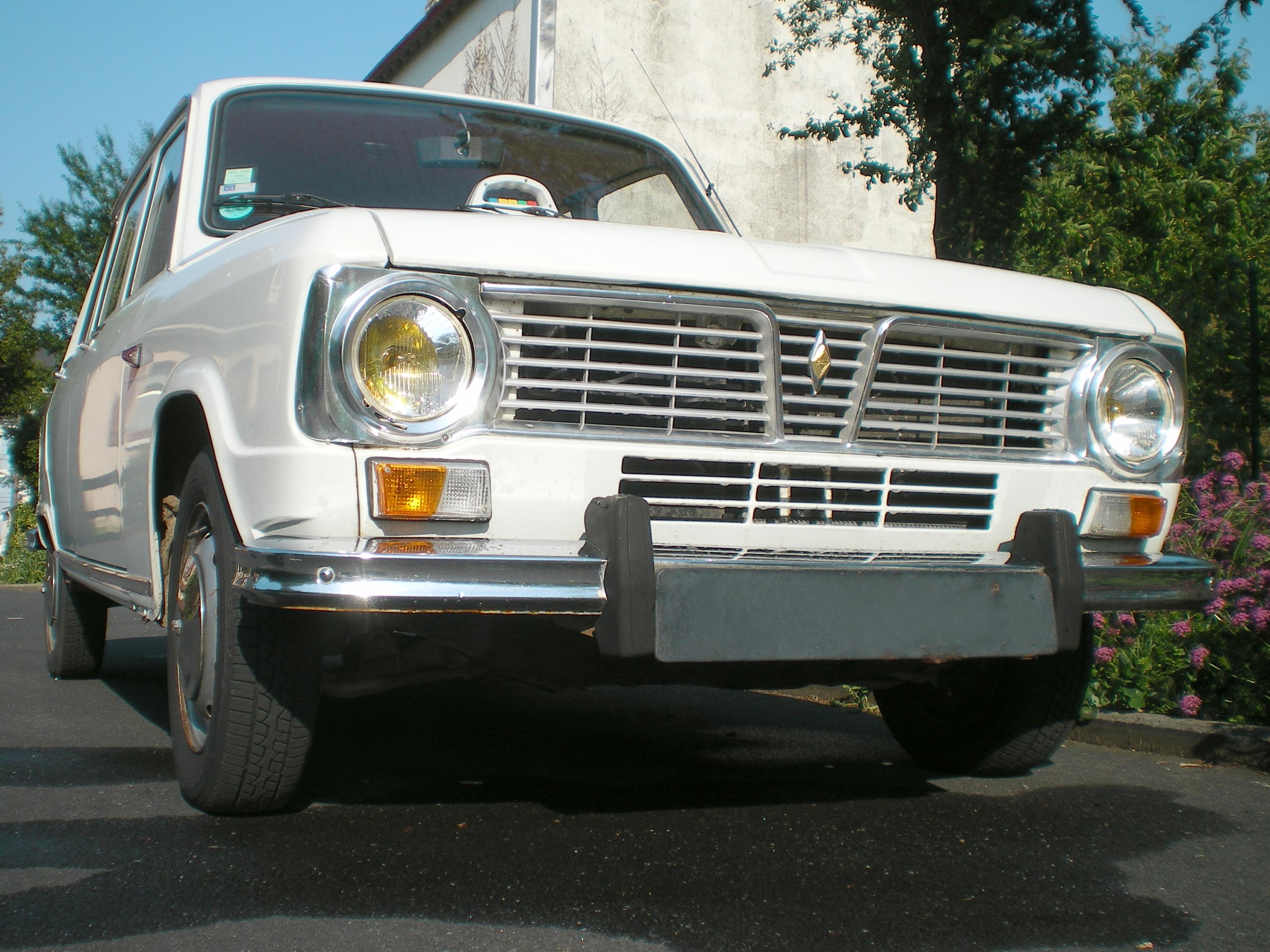 Renault 6 TL de 1971 - face avant